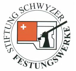 Logo Schwyzer Festungswerke, Schweiz